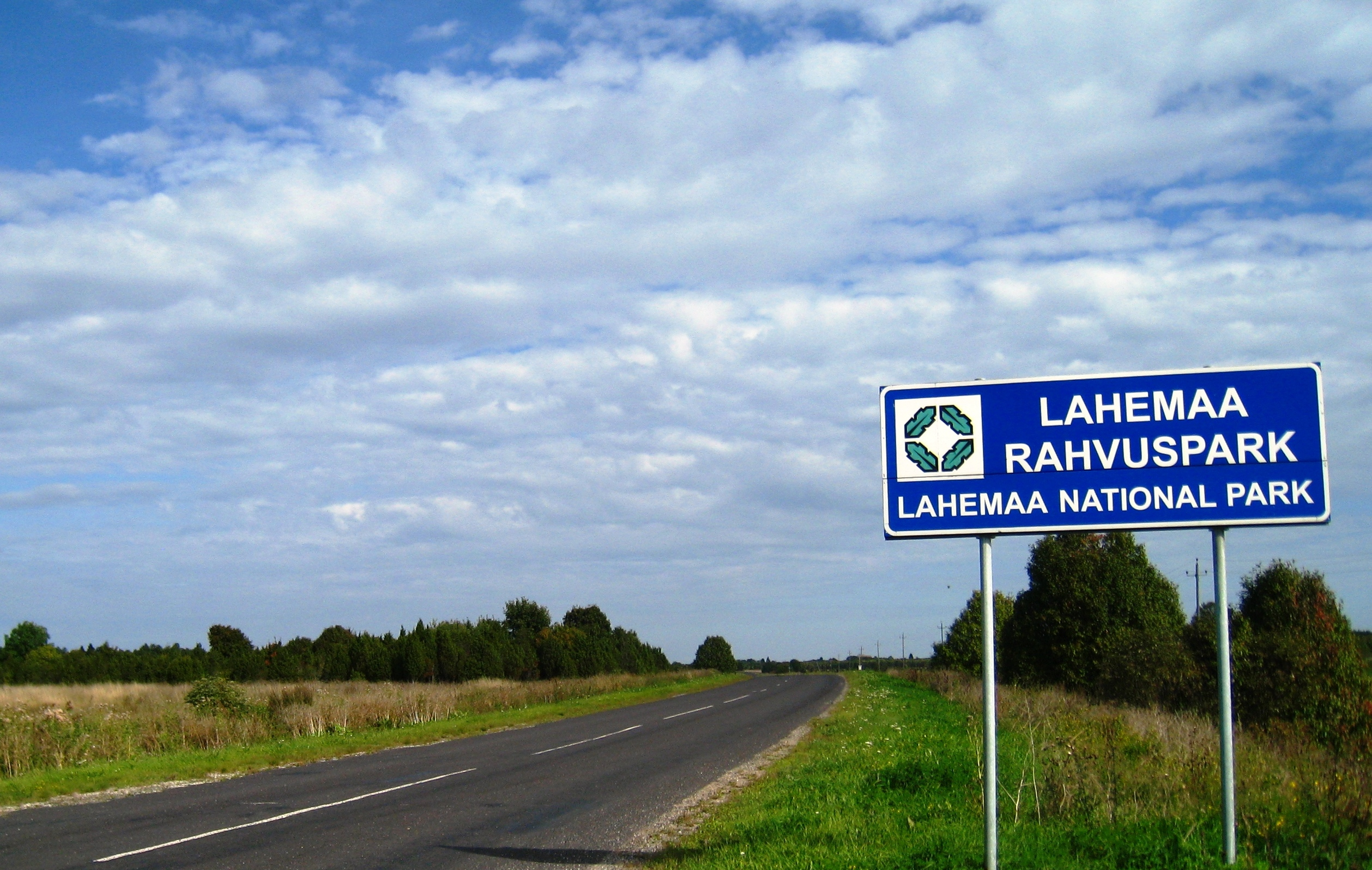 Lahemaa rahvuspark